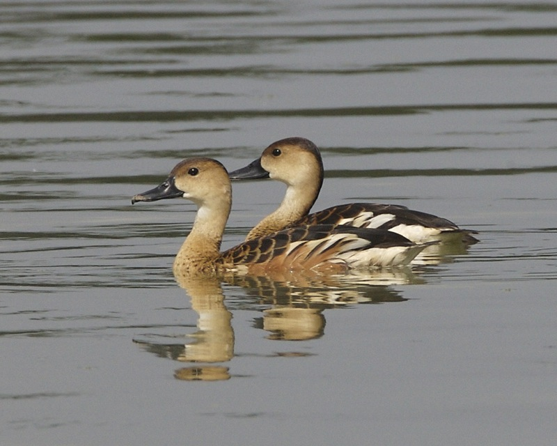 Wandering Whistling-Duck Dendrocygna arcuata ssp Dendrocygna arcuata arcuata Nusa Dua, Bali, Indonesia 29th. September 2008